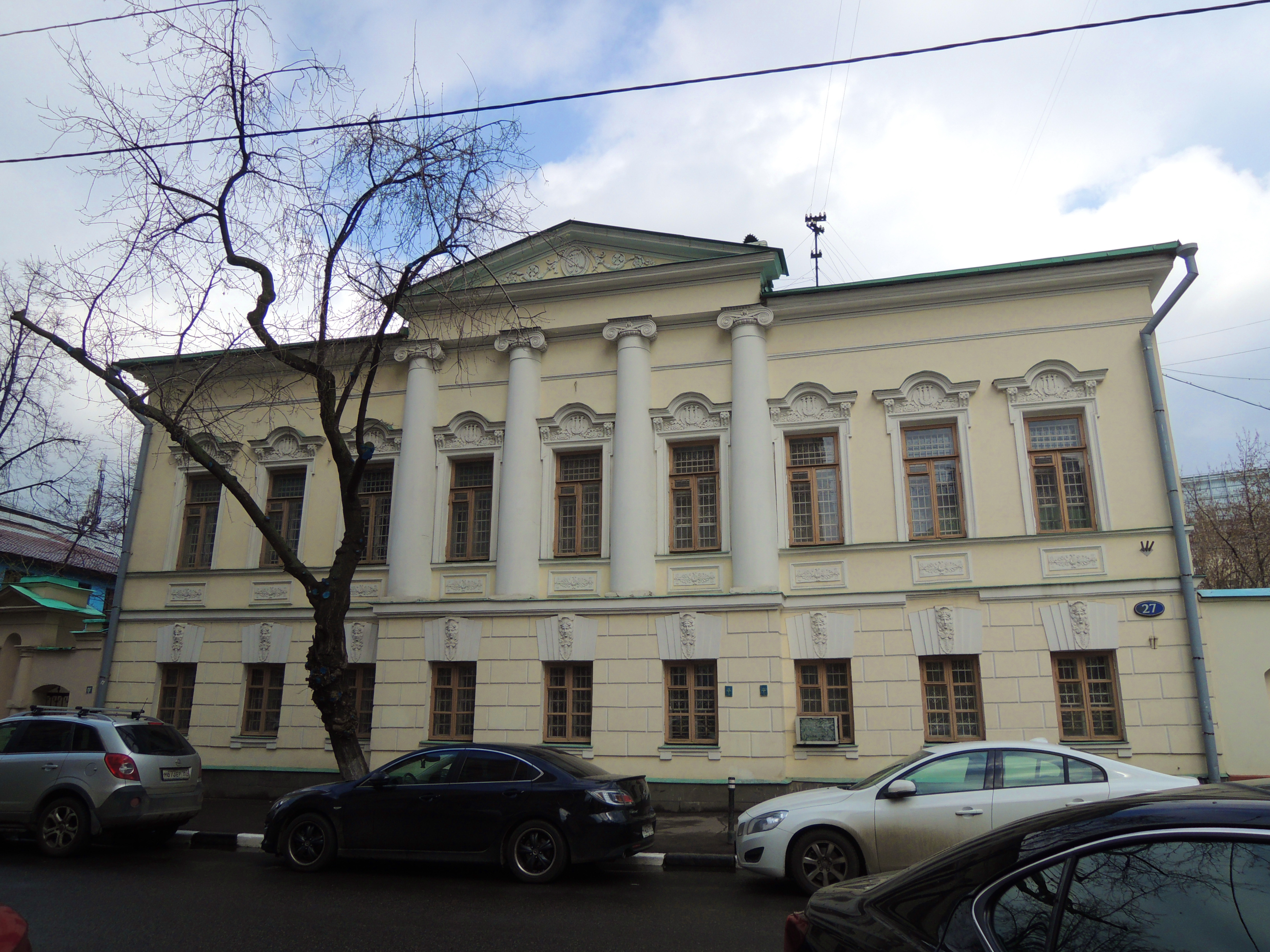 ул. Бахрушина, 27 Бывшая городская усадьба Варгина-Одинцовых Постройка XVIII—XIX века, ограда 1895 года.